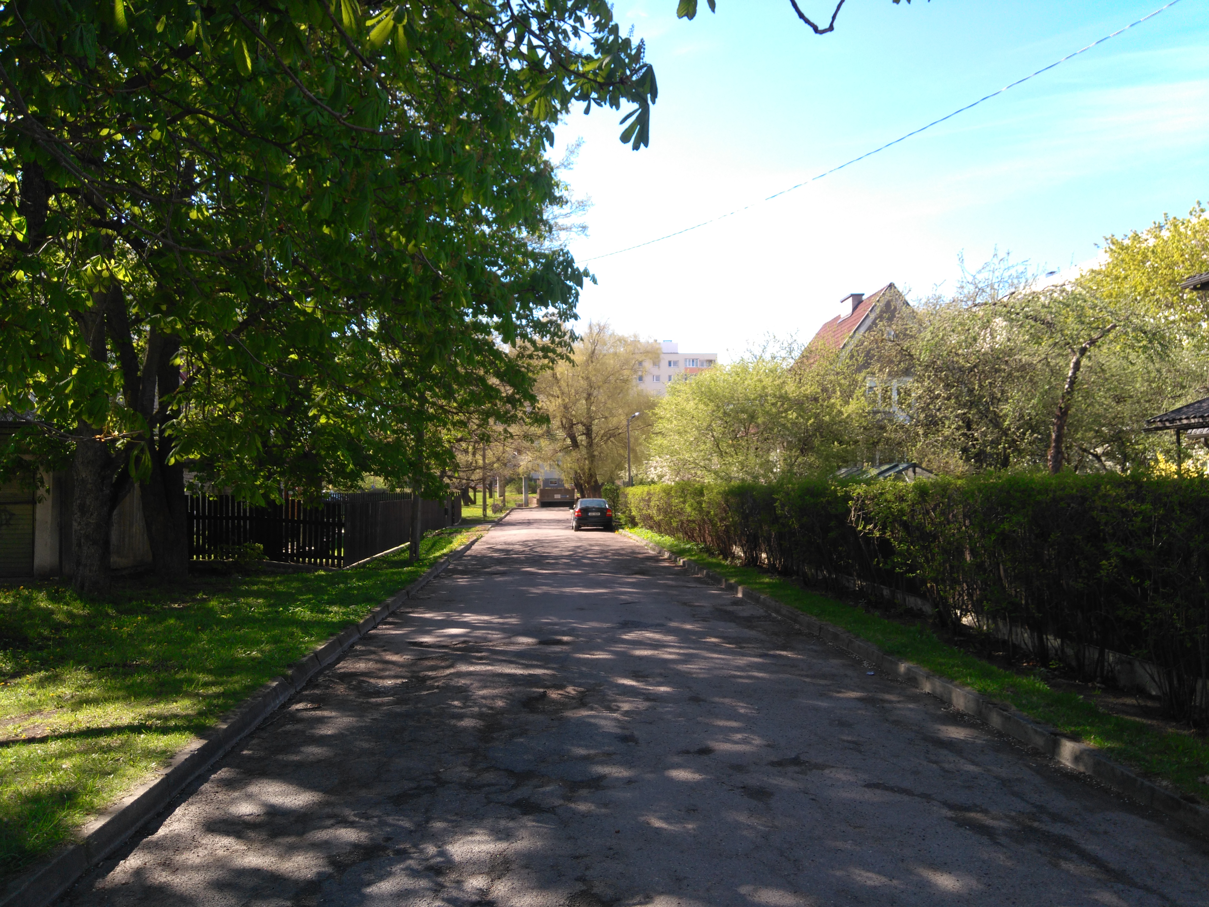 Mustasõstra tänav Tallinnas.